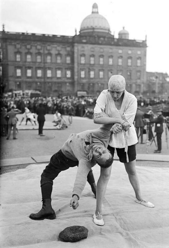 Zur Turn und Sportwoche Jiu-Jitsu und Boxkämpfe im Lustgarten in Berlin. Eine Dame einen Dolchangriff abwehrend.